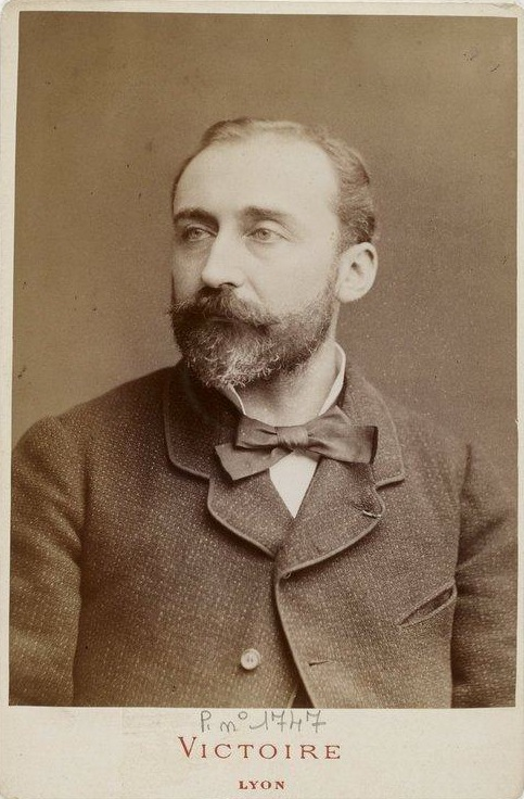 Charles de Chavannes (photographié par Victoire André en 1886). Membre de la Mission de l'Ouest Africain avec Savorgnan de Brazza.